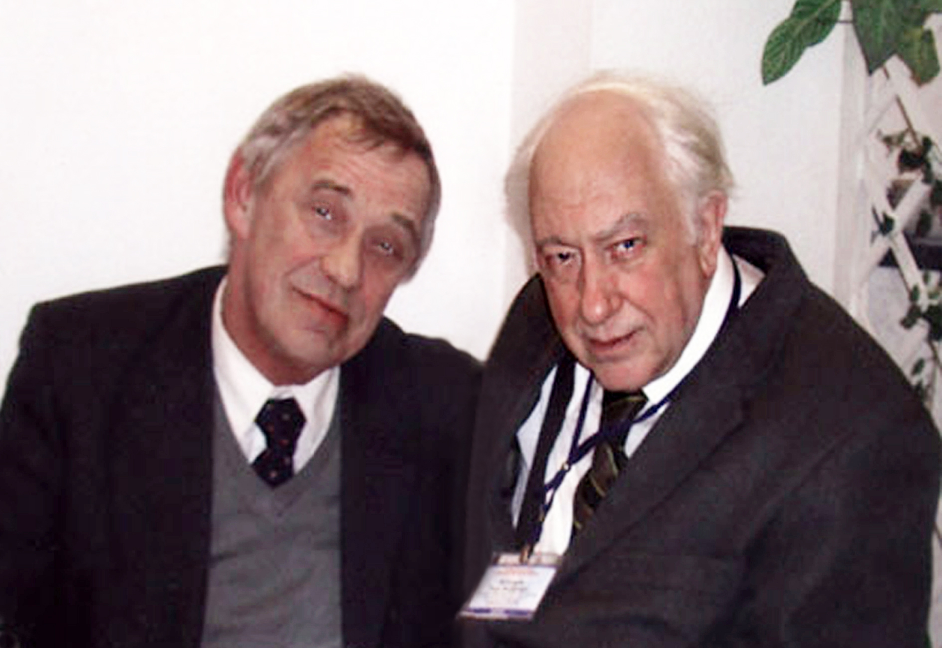 Профессор СПбГПМА Игорь Михайлович Воронцов и профессор ВМА Николай Павлович Шабалов